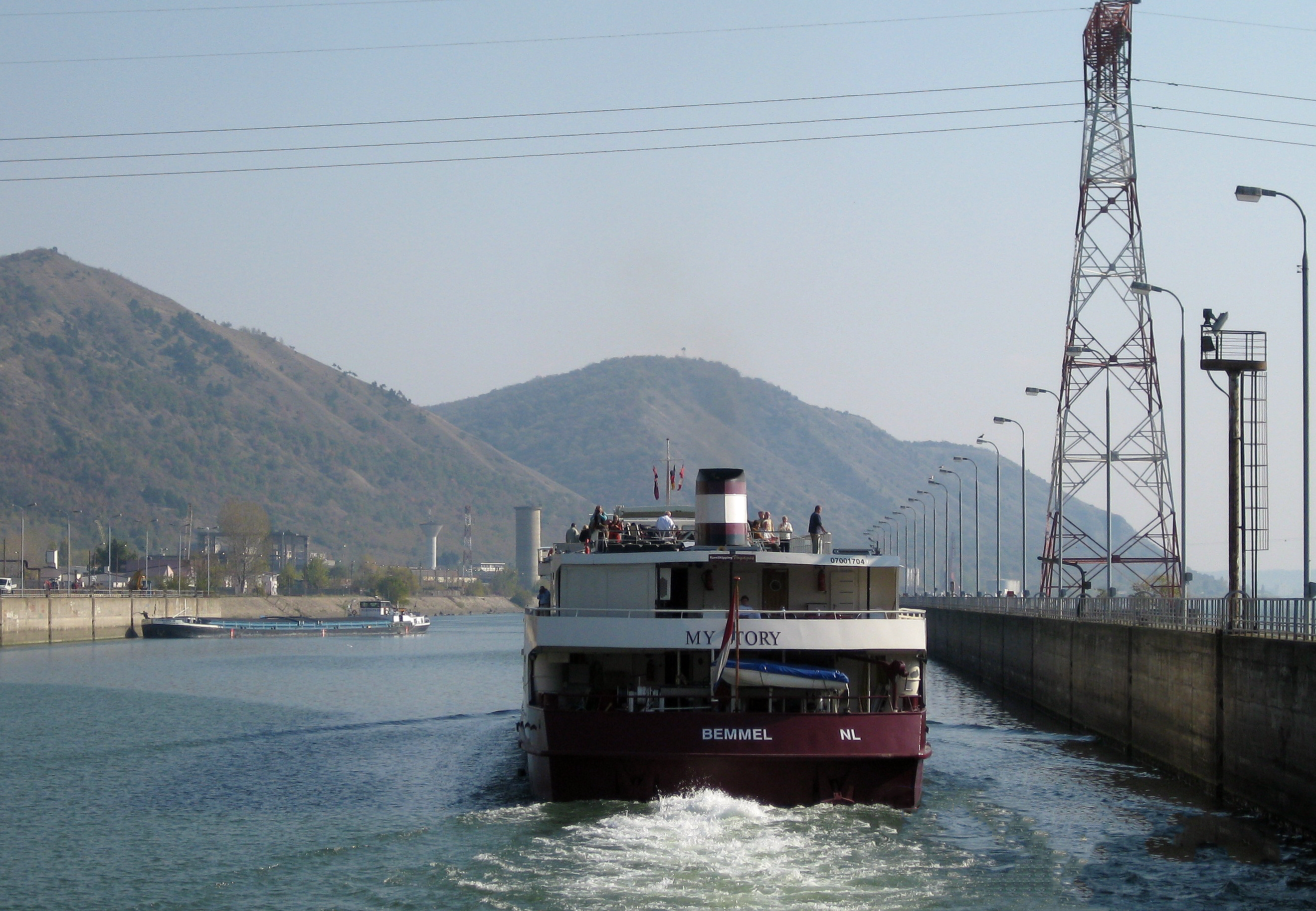 Kabinenfahrgastschiff My Story auf der Donau